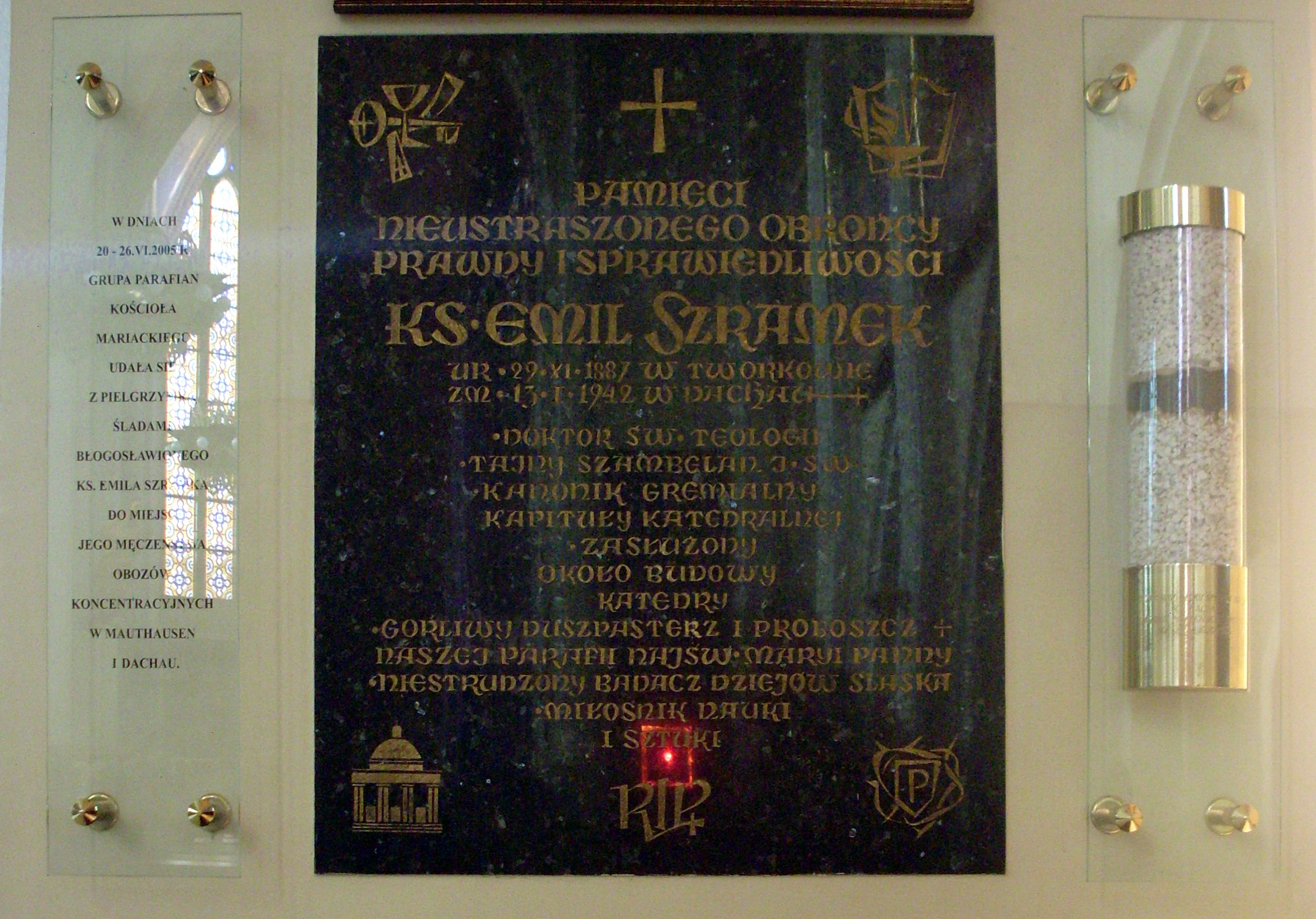 Tablica w Kościele Mariackim w Katowicach pamięci Emila Szramka